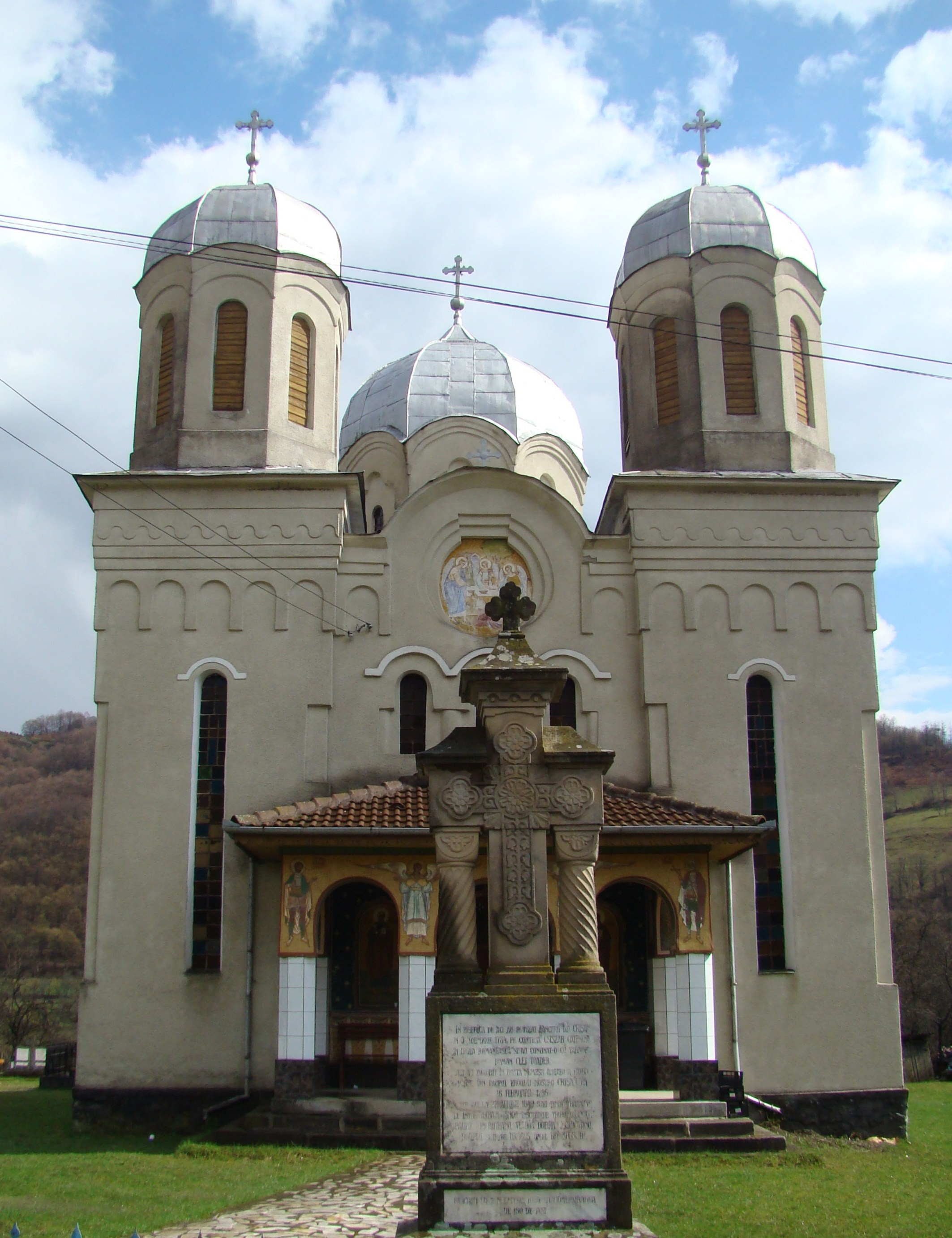 Troiță în fața bisericii ortodoxe din Mihăileni, județul Hunedoara